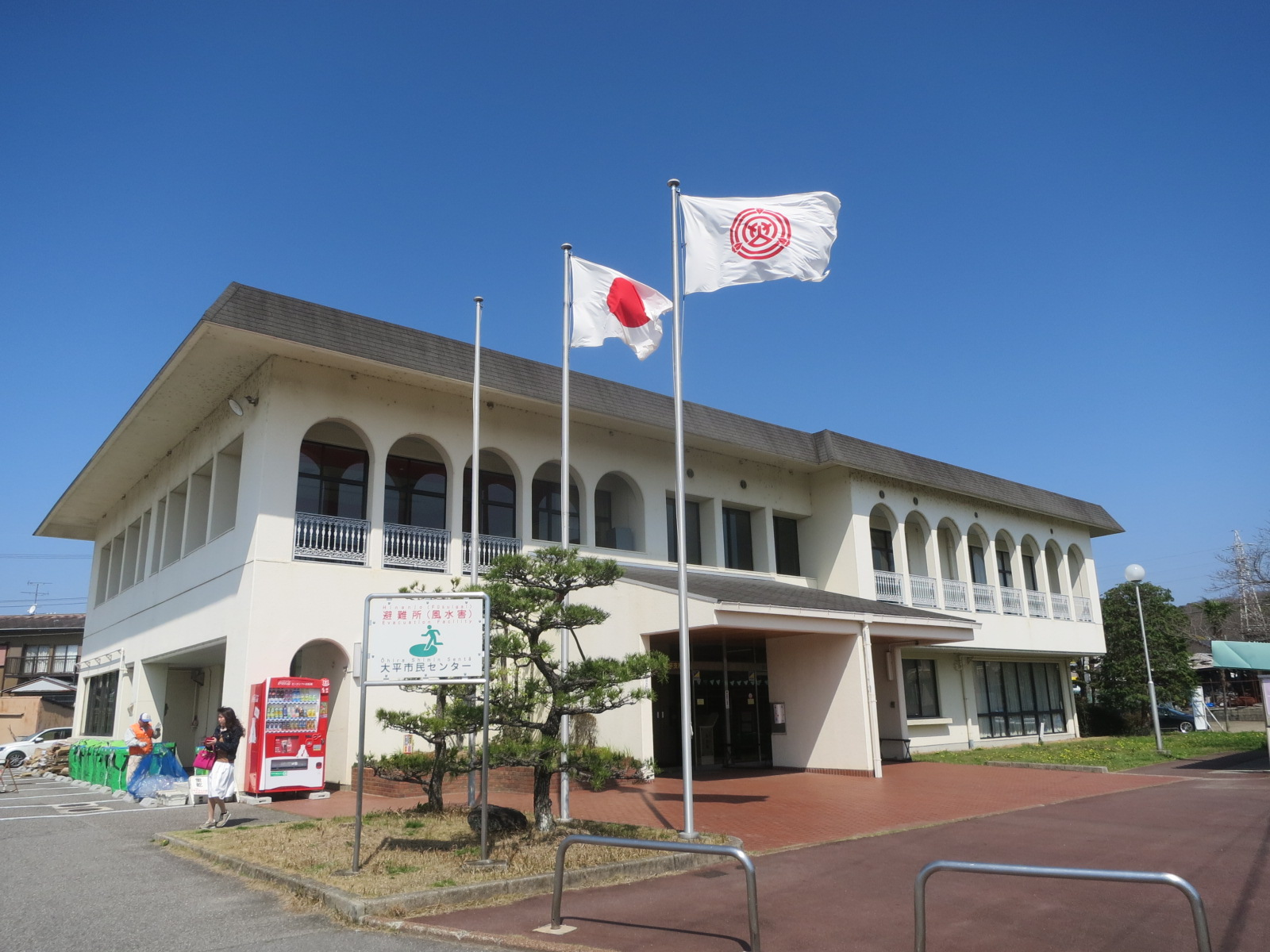 岡崎市大平市民センター